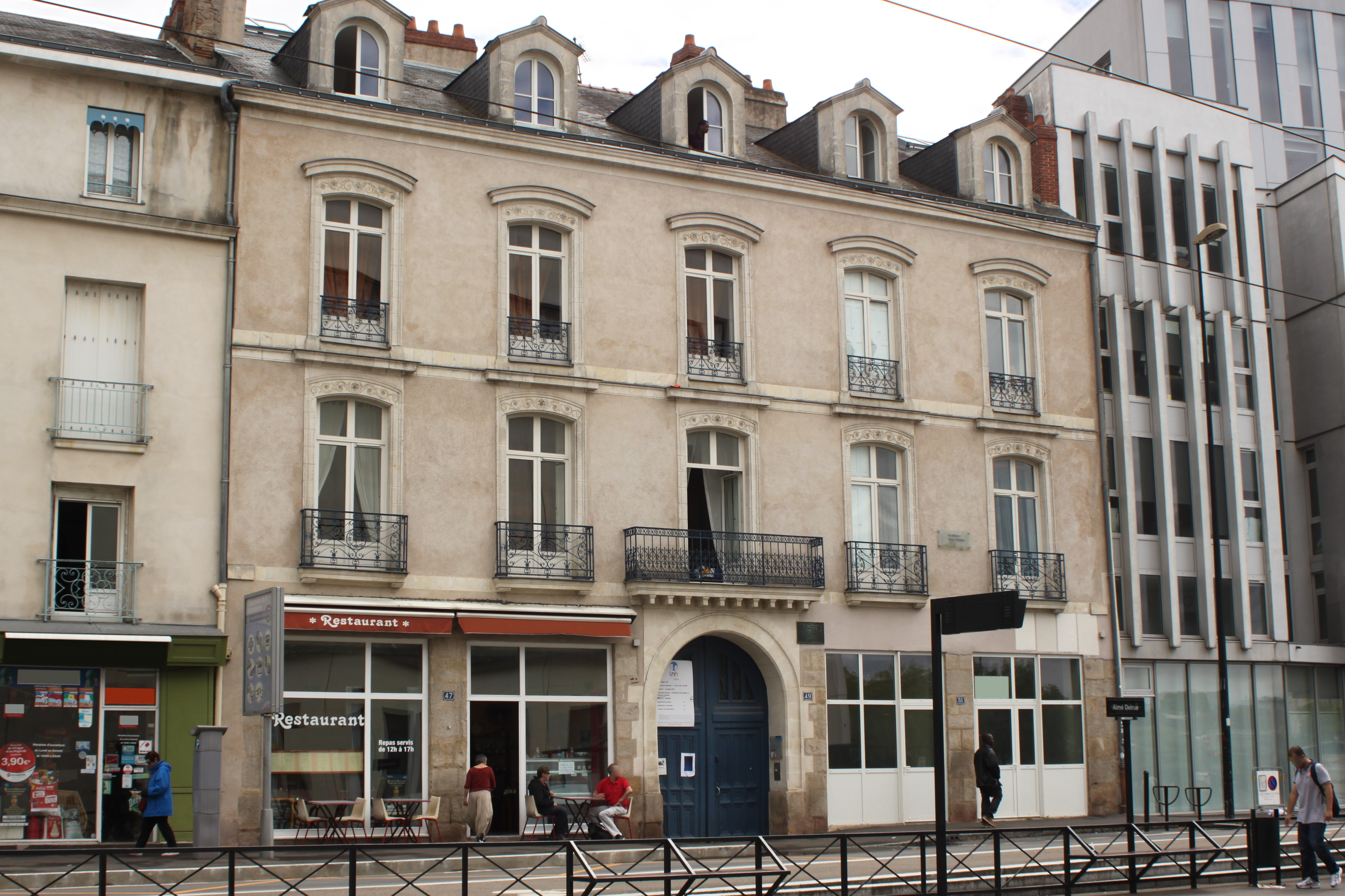 Maison où le Général Audibert créé, en 1943, l'O.A.S. de l'Ouest de la France, 49 chaussée de la Madeleine, Fr-44-Nantes.